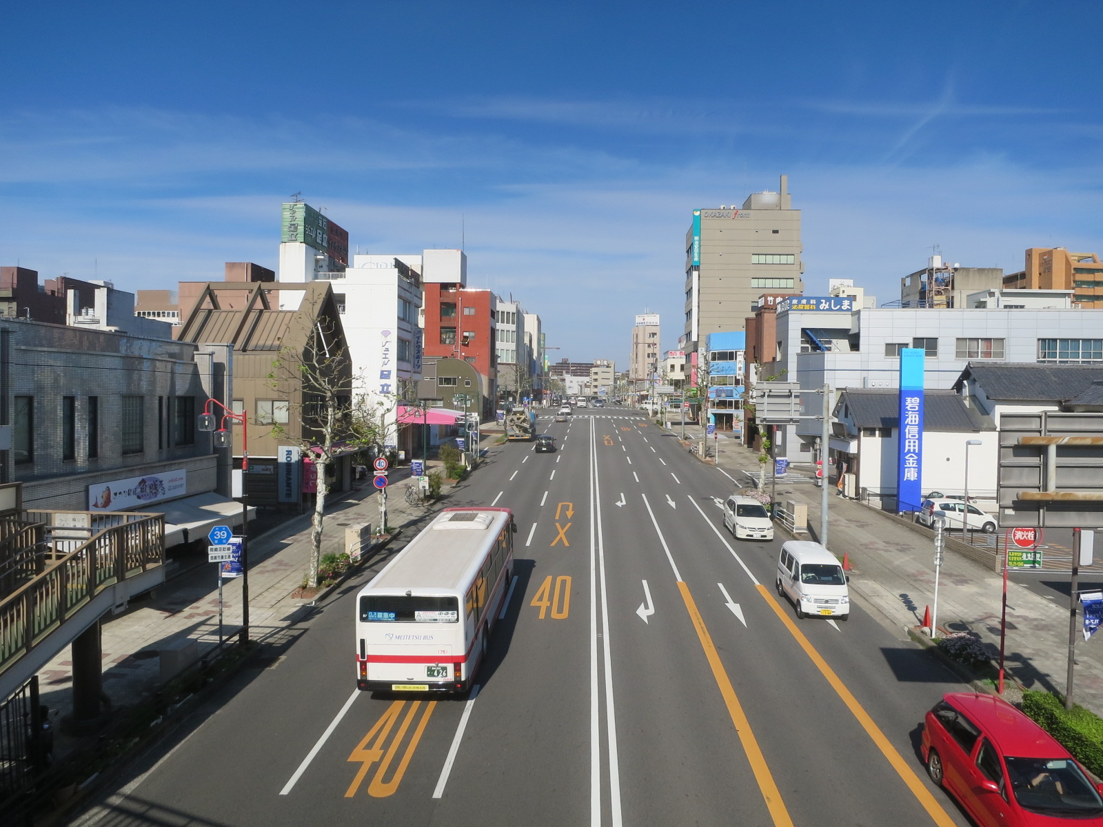 愛知県道39号岡崎足助線